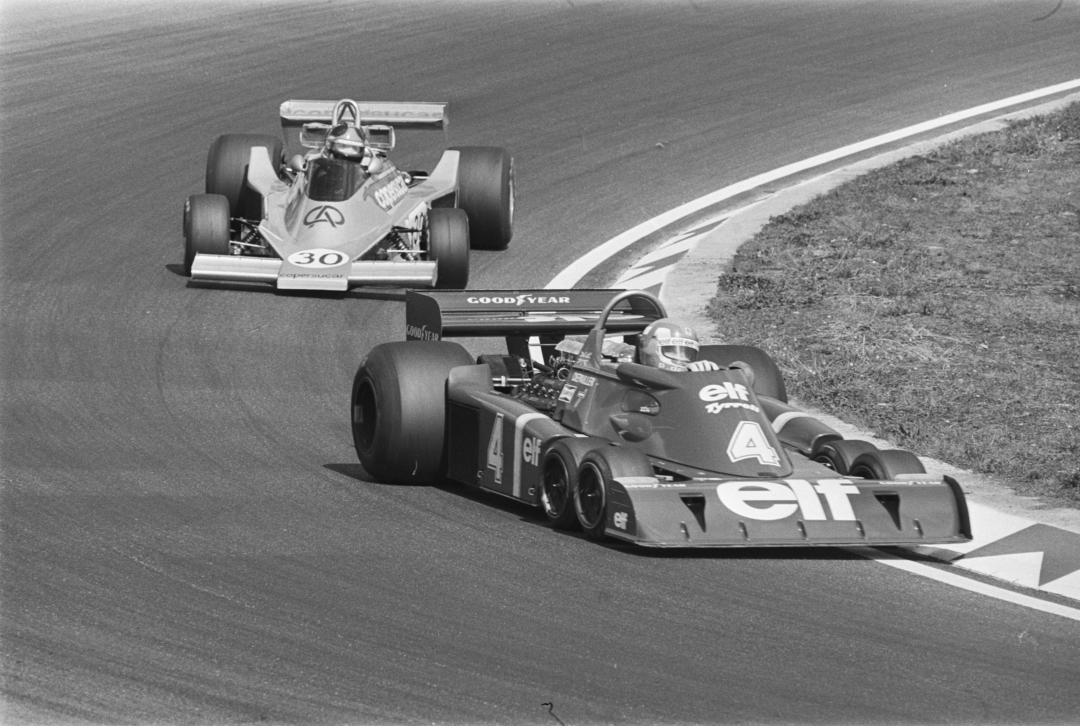 Training Grand Prix op Zandvoort; De Tijssell 34 (met zes wielen) met Depailler, achter hem Fittipalchi met een Coperrucar.